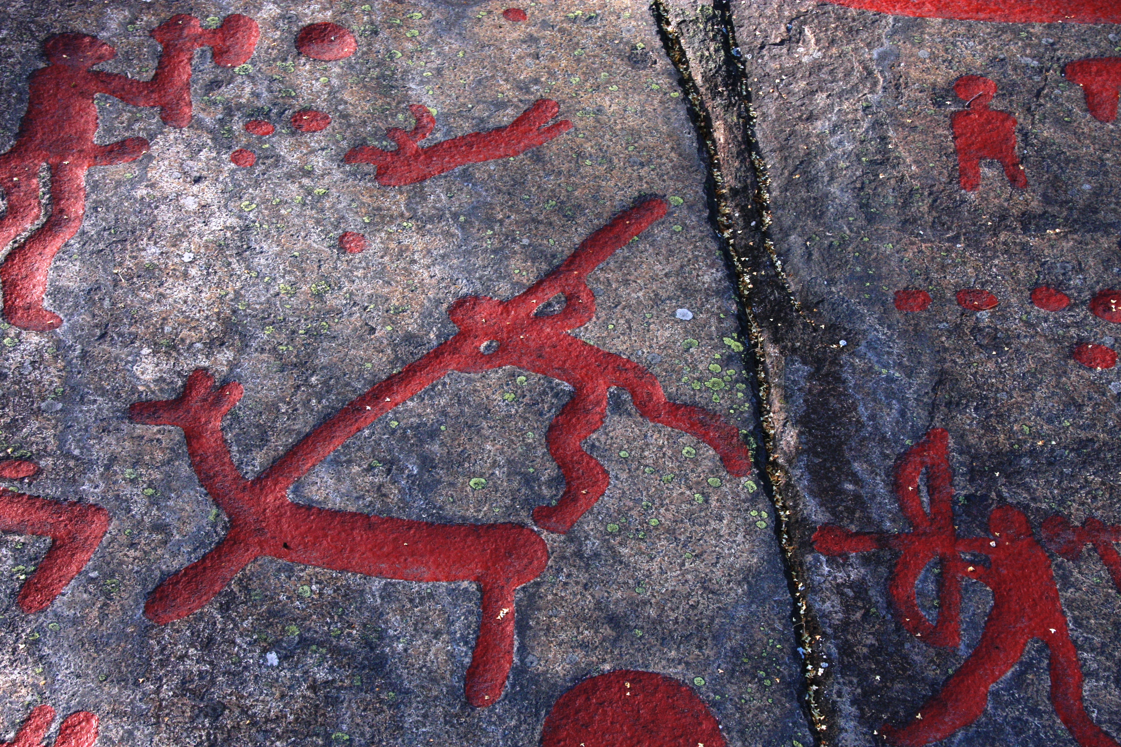 Hällristning i fält 255 vid Fossum, öst för Tanum tätort i Tanums kommun - Bohuslen